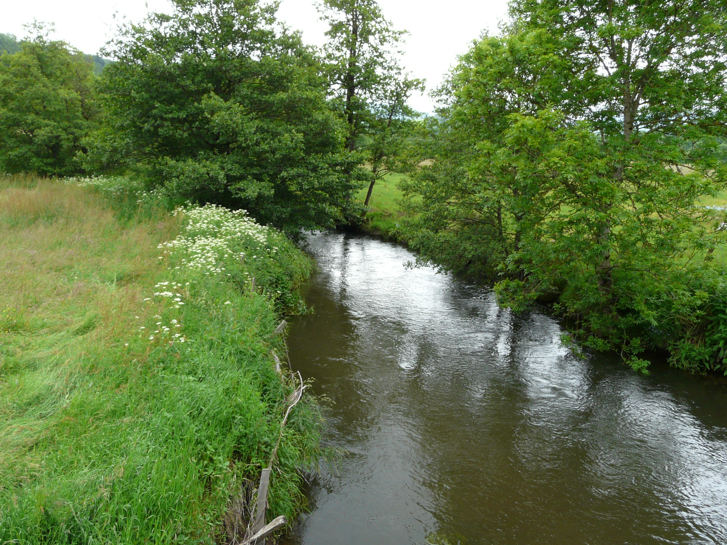 La Petite Rhue au pont de la route menant à Champoudoux, Cheylade, Cantal, France. Vue prise en direction de l'amont.